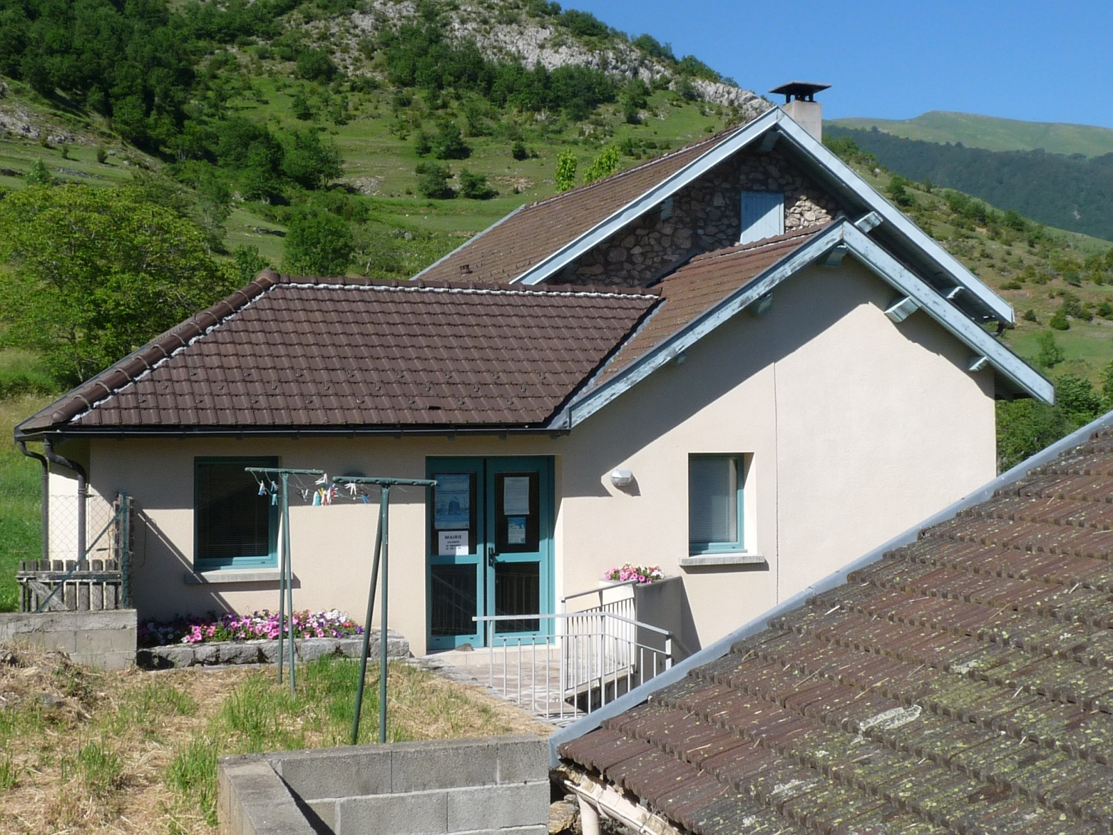 Mairie de Bestiac, Ariège, France